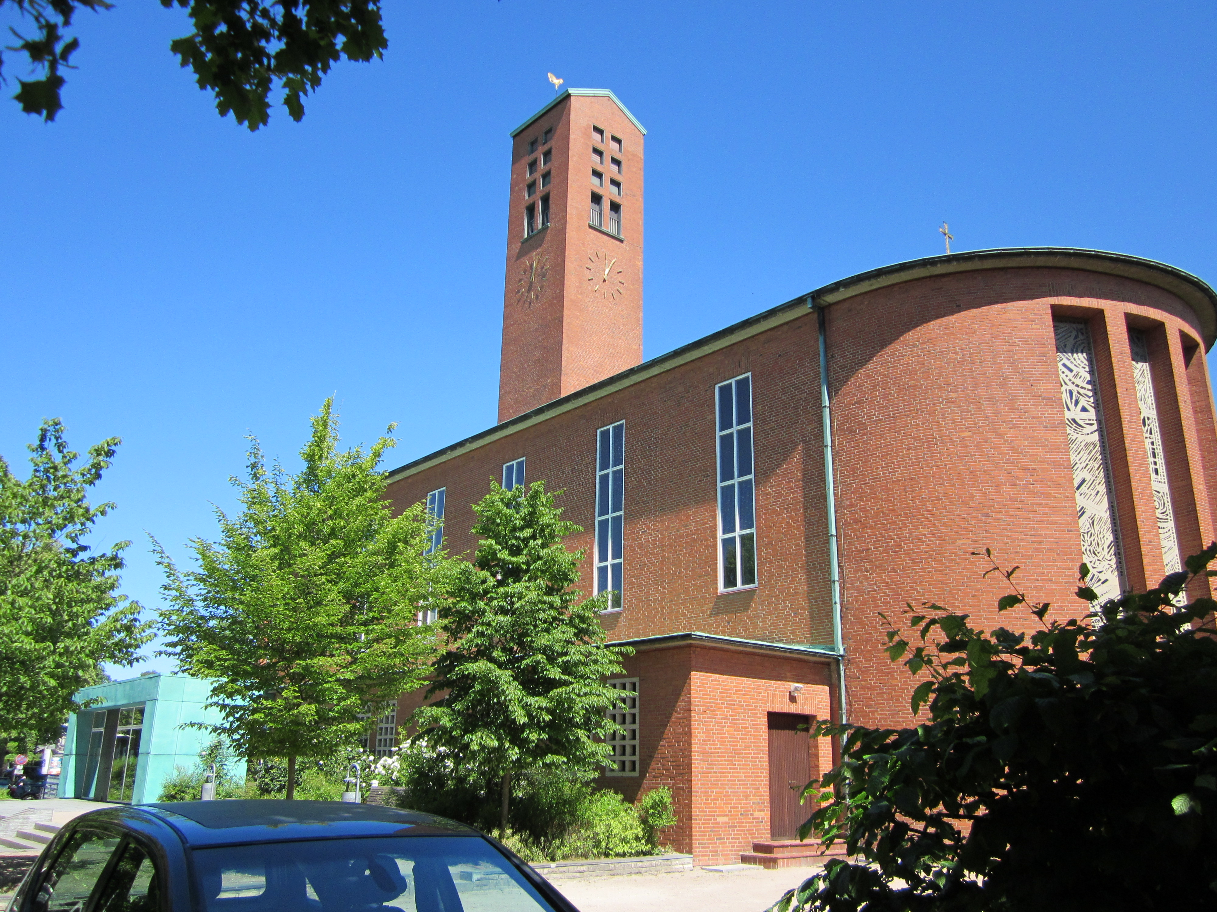 Die evangelisch-lutherische Epiphanienkirche in der Semperstraße in Winterhude wurde 1961/62 nach den Plänen Friedrich Ostermeyers erbaut und zählt zu dessen letzten Werken.